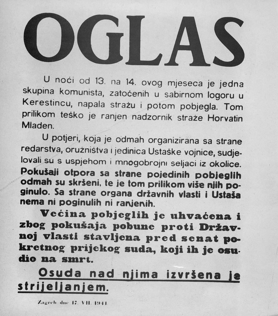 Srpskohrvatski / српскохрватски: Oglas od 27. VII godine 1941. o bjekstvu iz Kerestinca 13. na 14. srpnja 1941.